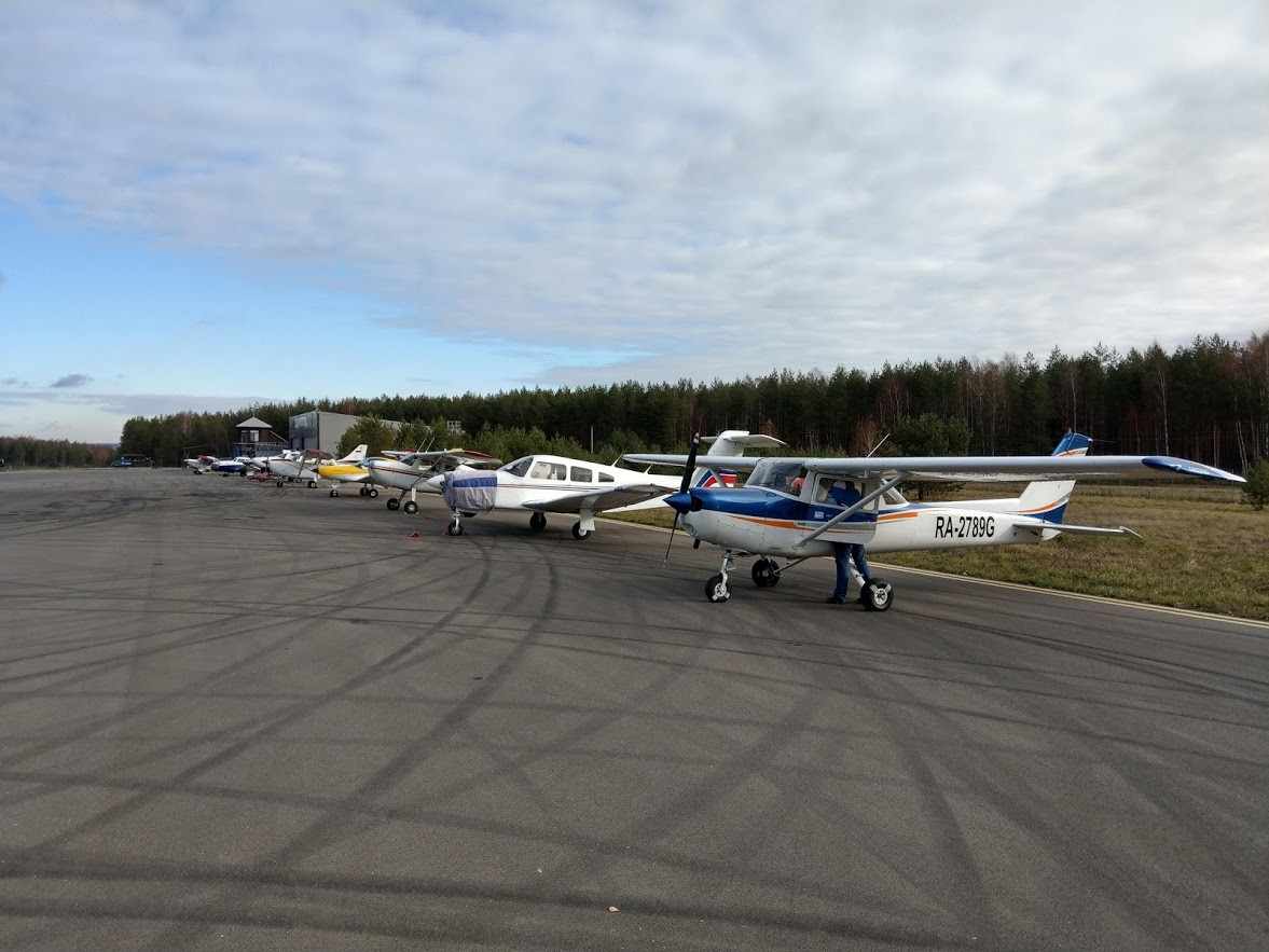 Легкая авиация